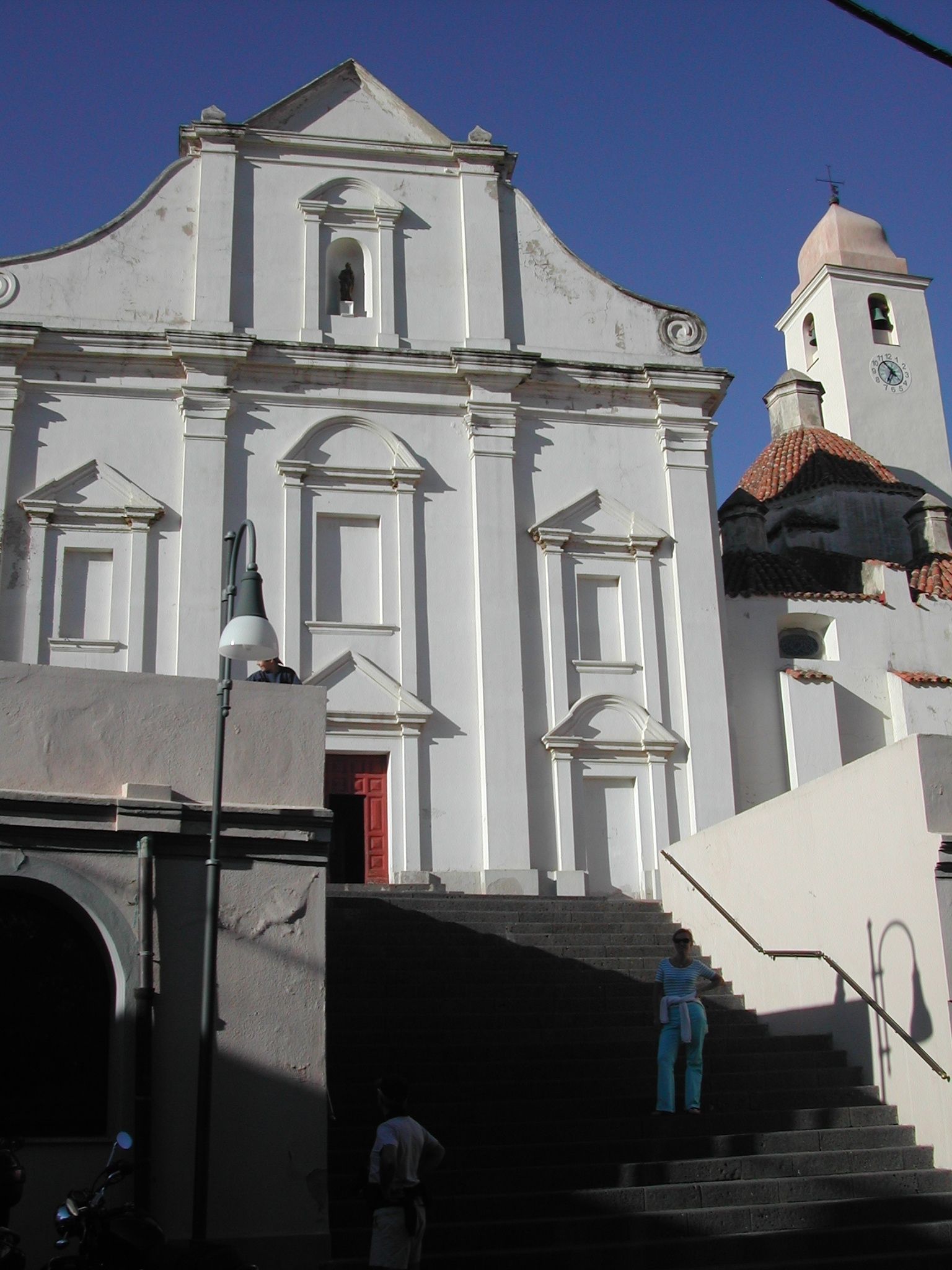 Orosei: Chiesa di San Giacomo Maggiore